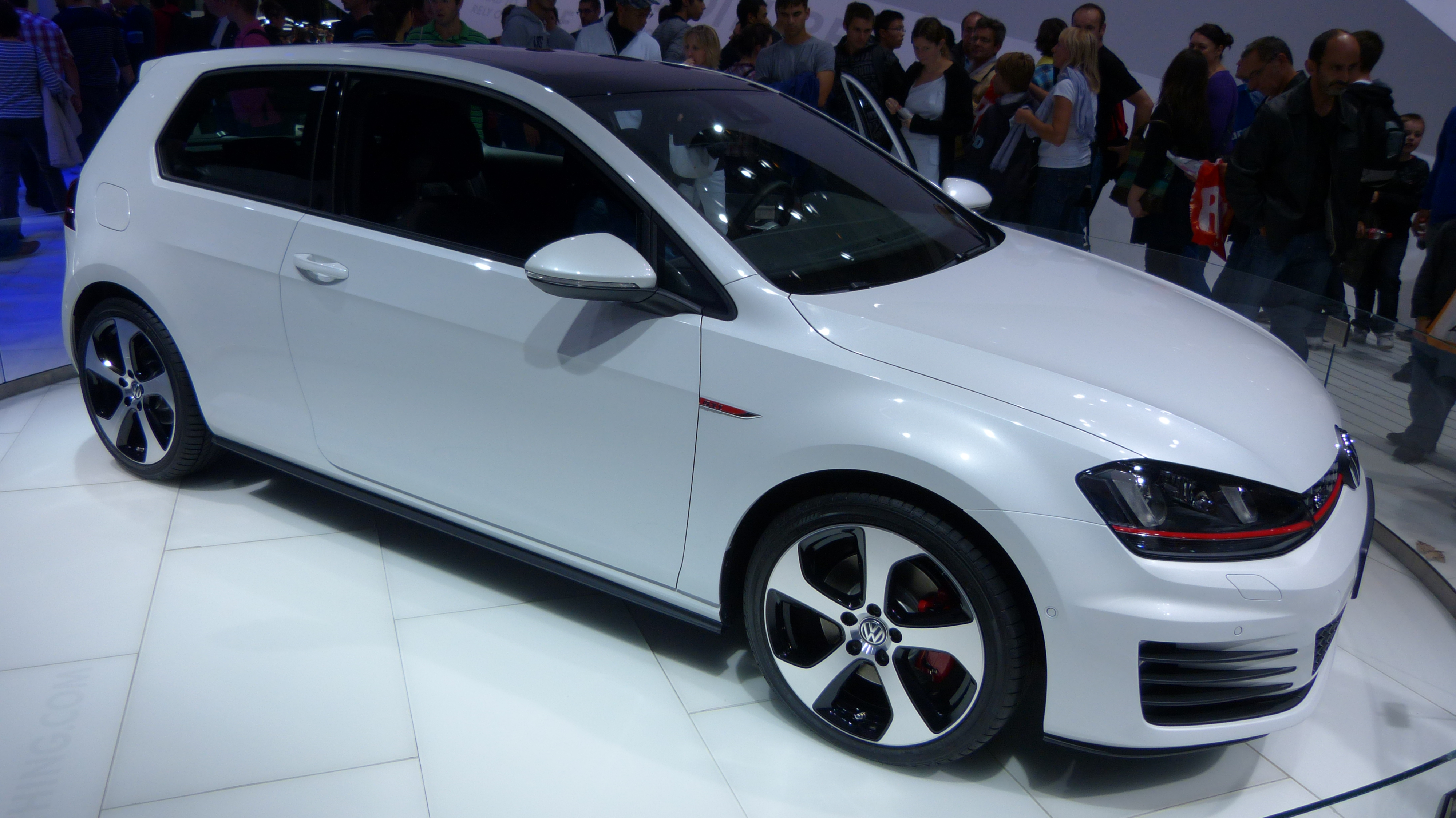 Mondial de l'automobile de Paris 2012